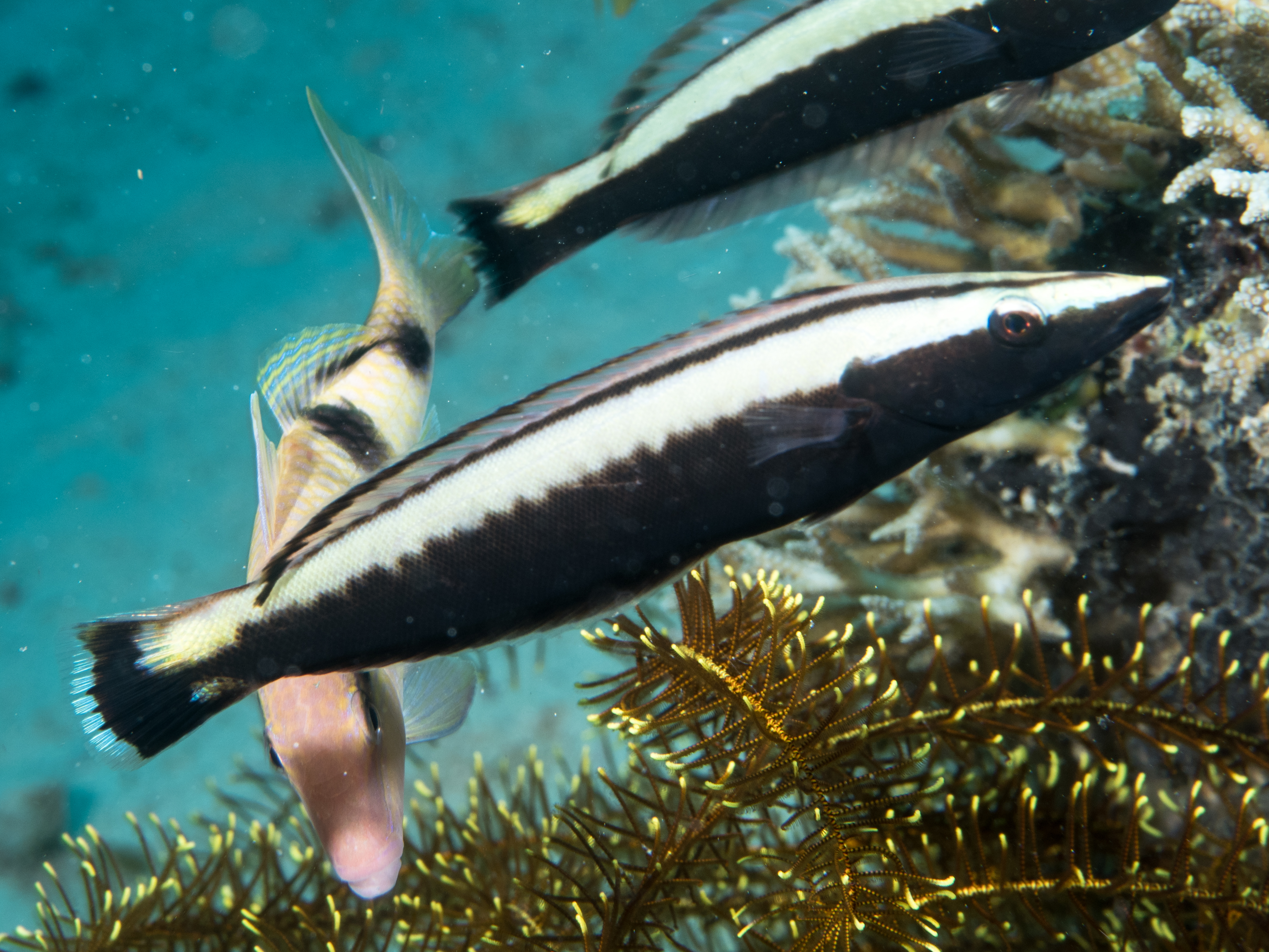 Romblon, Philippines - Ring wrasse juvenile (Hologymnosus annulatus)